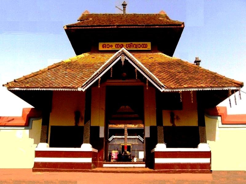 വാഴപ്പള്ളി ക്ഷേത്ര ഗോപുരം